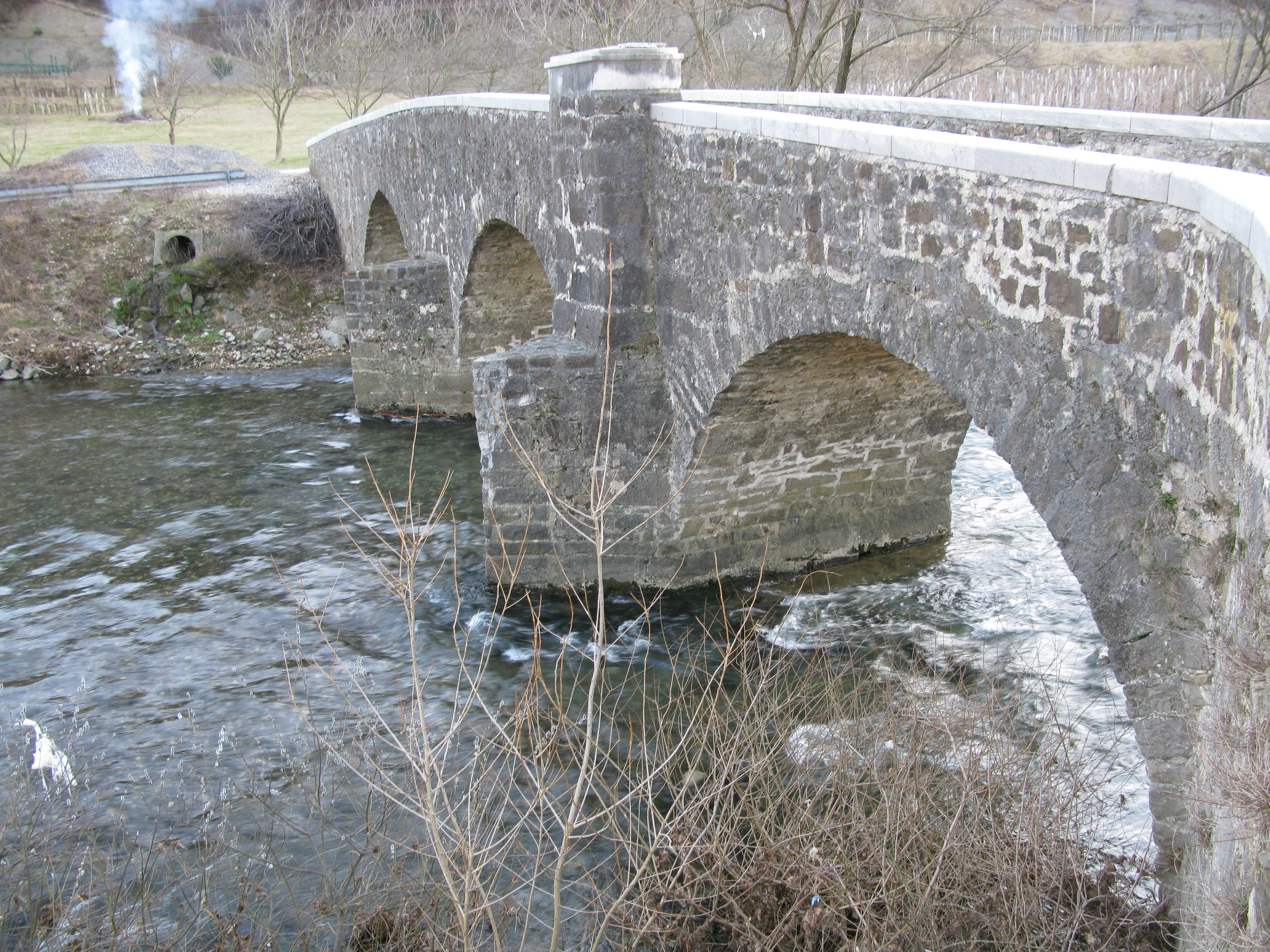 Stari most čez Vipavo